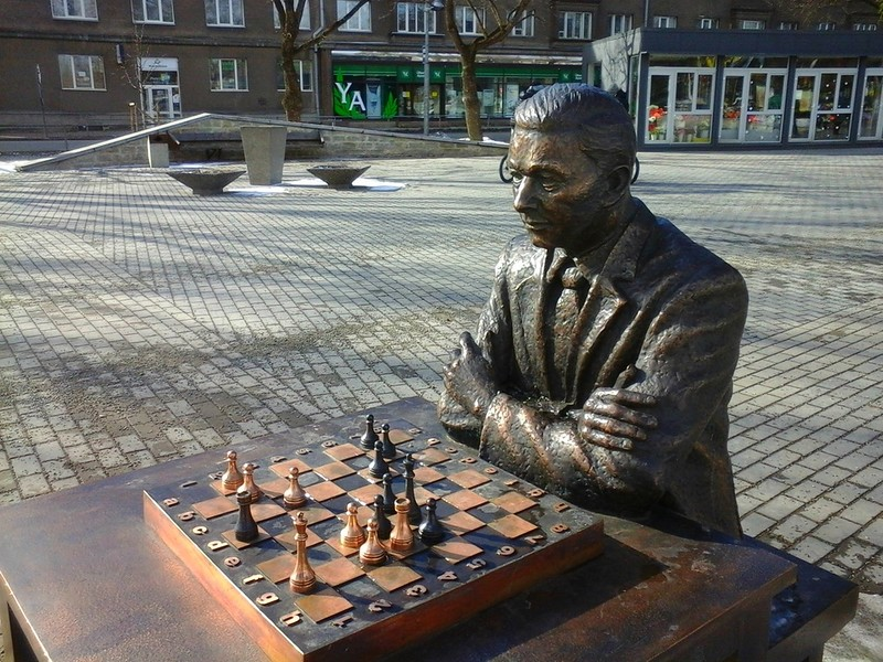 Памятник Паулю Кересе в Нарве